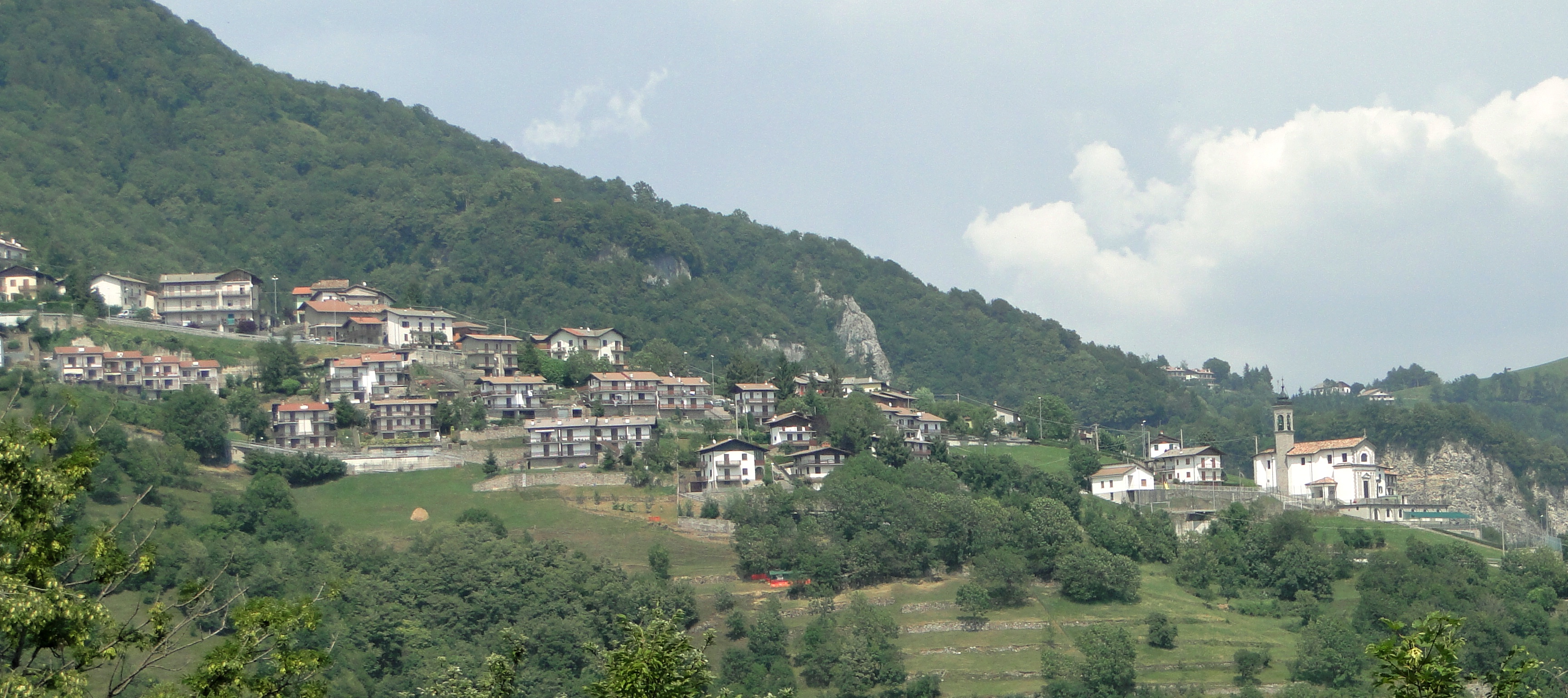 Vista di Amora, fraz. di Aviatico (BG)